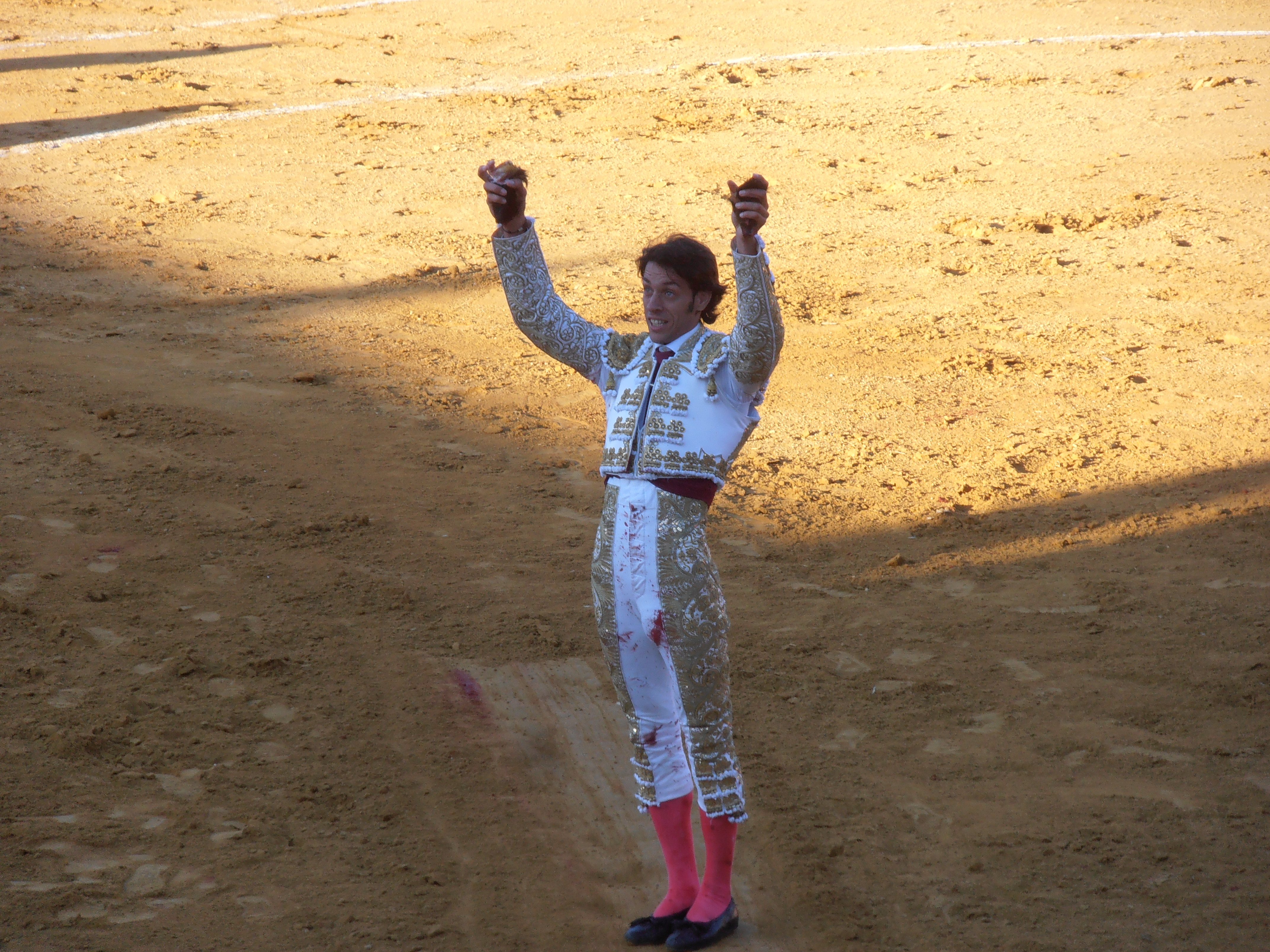 El torero Antonio Nazaré, corta dos orejas en la plaza de toros de Béjar el 8 de septiembre de 2013